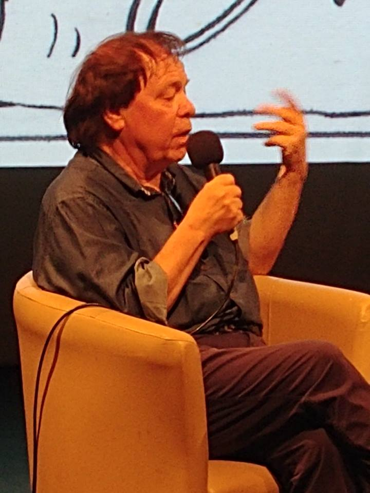 François Walthéry en conférence au Centre Wallonie-Bruxelles de Paris, le 14 juin 2018.